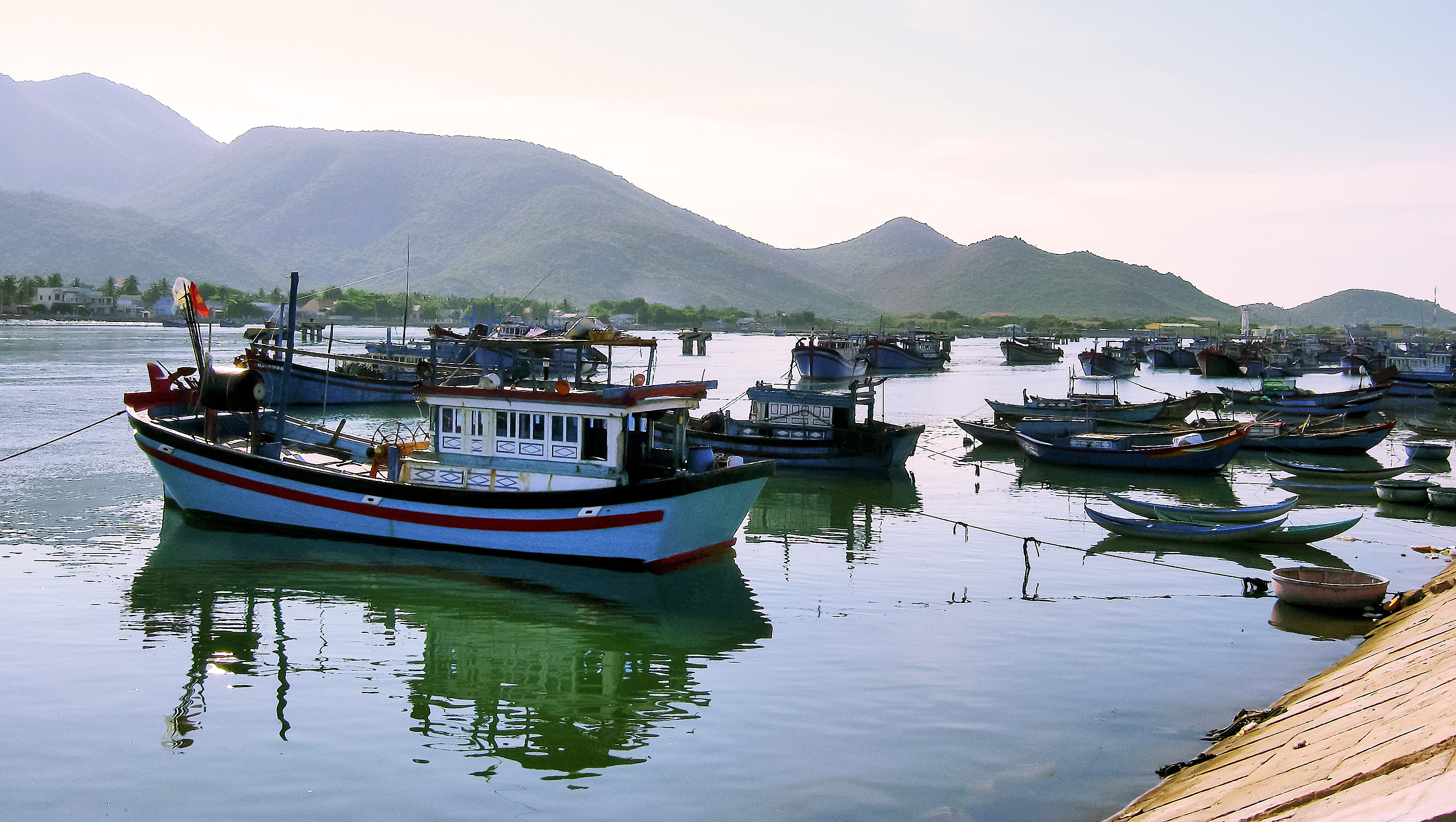 Bến tàu đánh bắt hải sản ở sau chợ thị trấn Khánh Hải, thuộc huyện Ninh Hải, tỉnh Ninh Thuận, Việt Nam.